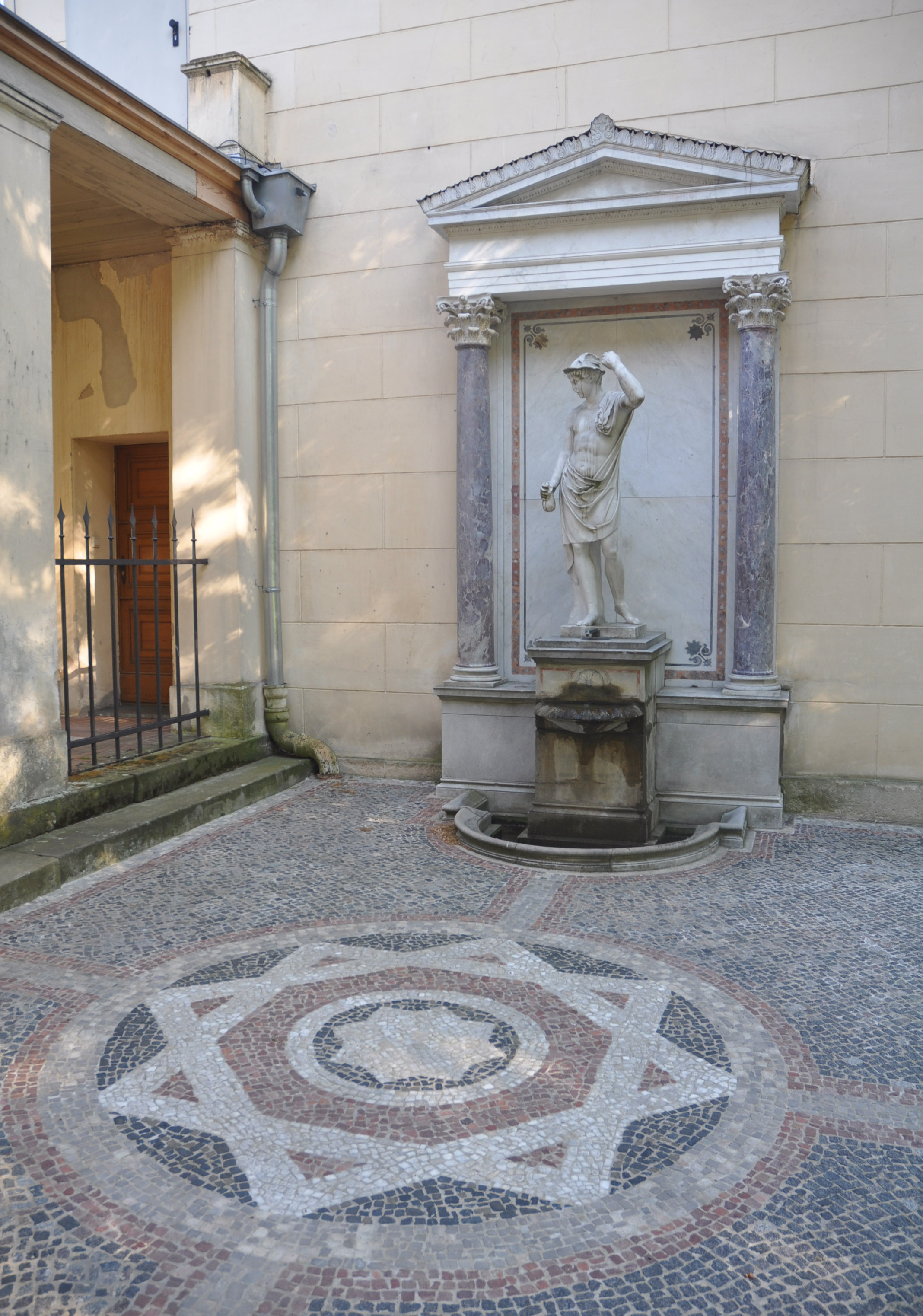 Park Klein-Glienicke, Merkurbrunnen und Adjutantenterrasse